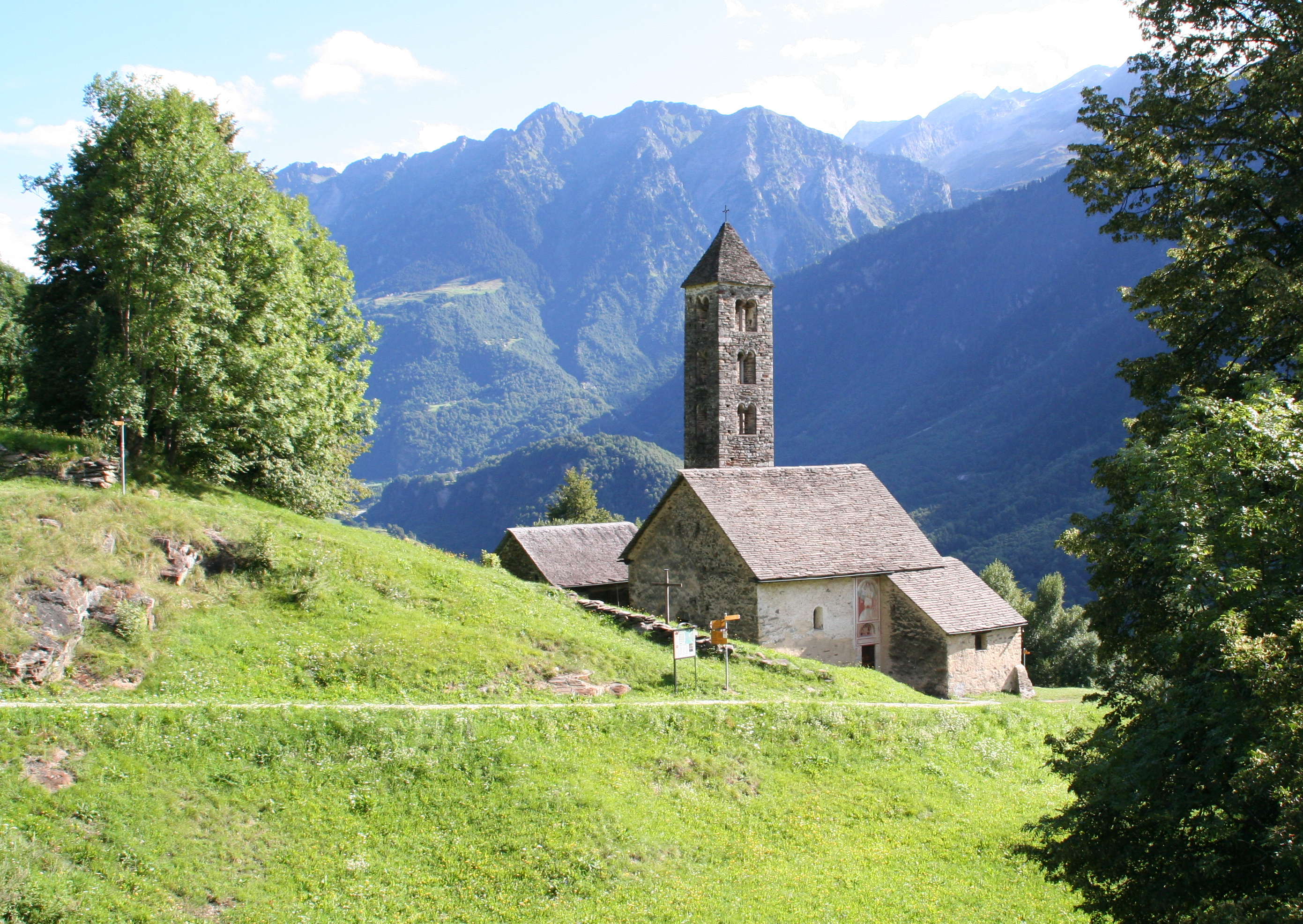 Ansicht von oben